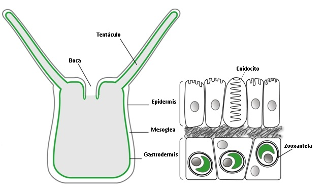 Plan de organización corporal de un anthozoo simbionte. Capas dérmicas. Adaptación del archivo "Anemonia viridis body organisation", del artículo "Comprehensive EST analysis of the symbiotic sea anemone, Anemonia viridis", de Cécile Sabourault el al (2009). ( (License CC by-2.0)